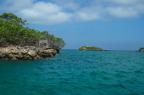 Karibiska havet i Colombia (Rosarioöarna)